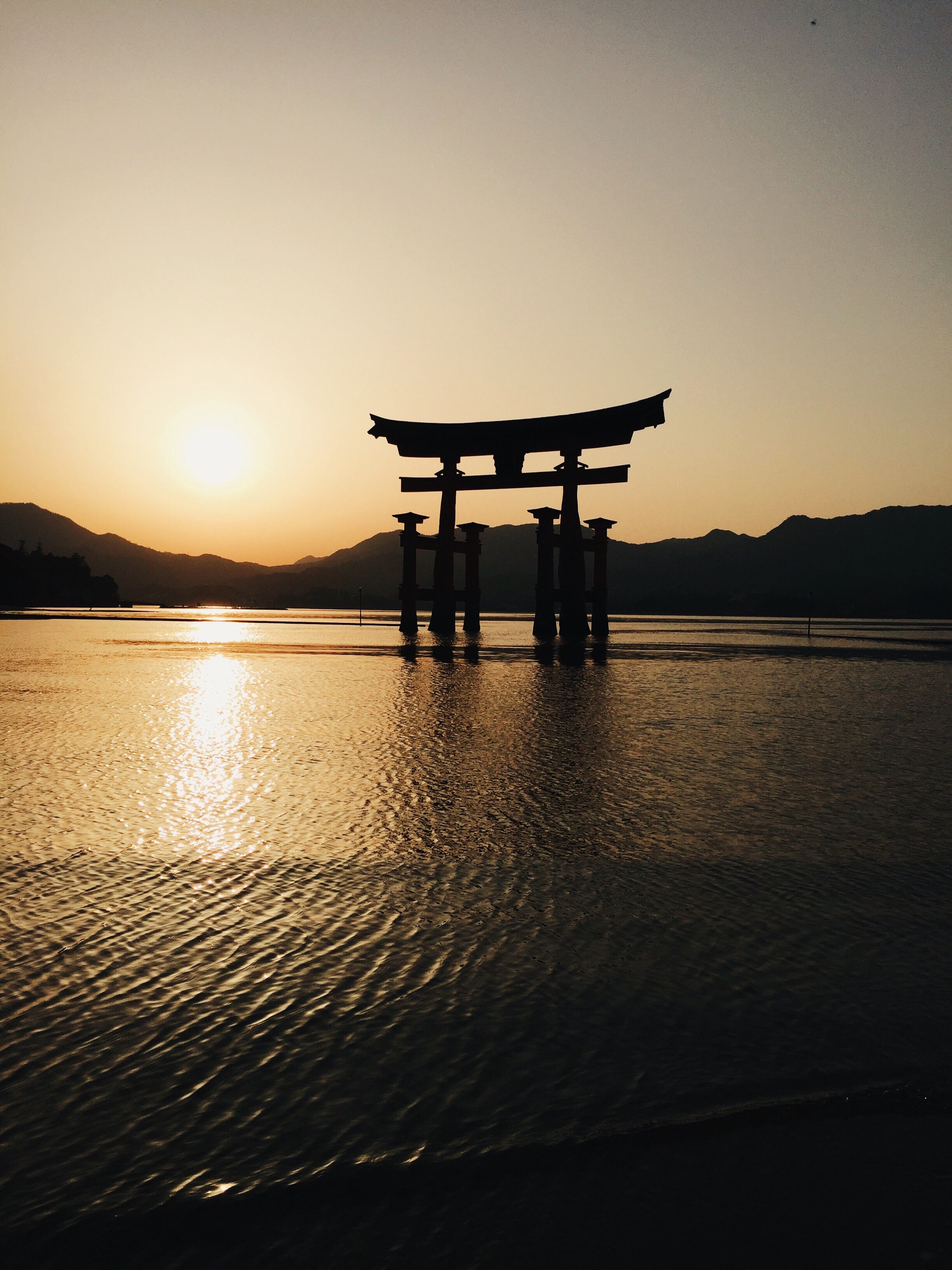 Portal